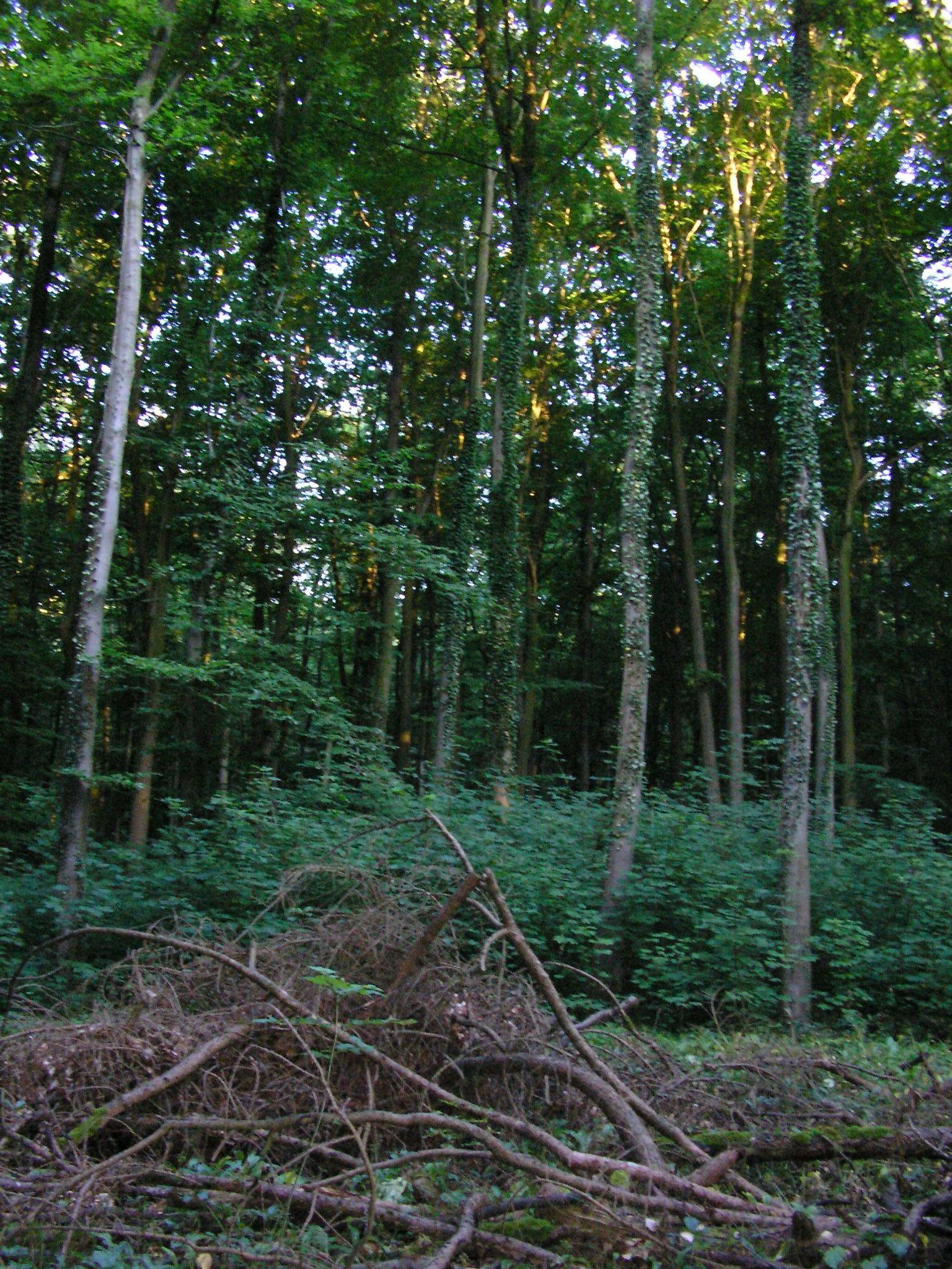 Wald im NSG Sonnenwinkel